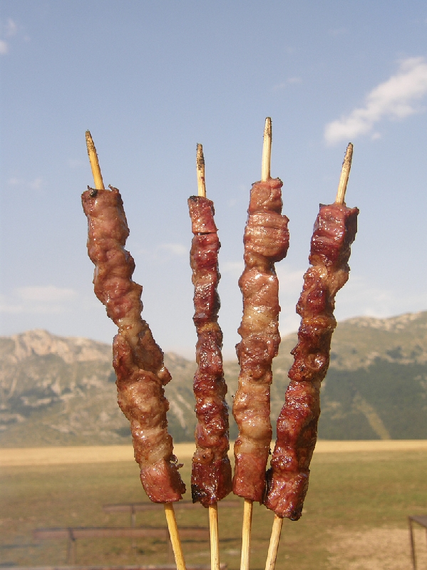 Arrosticini Campo Imperatore